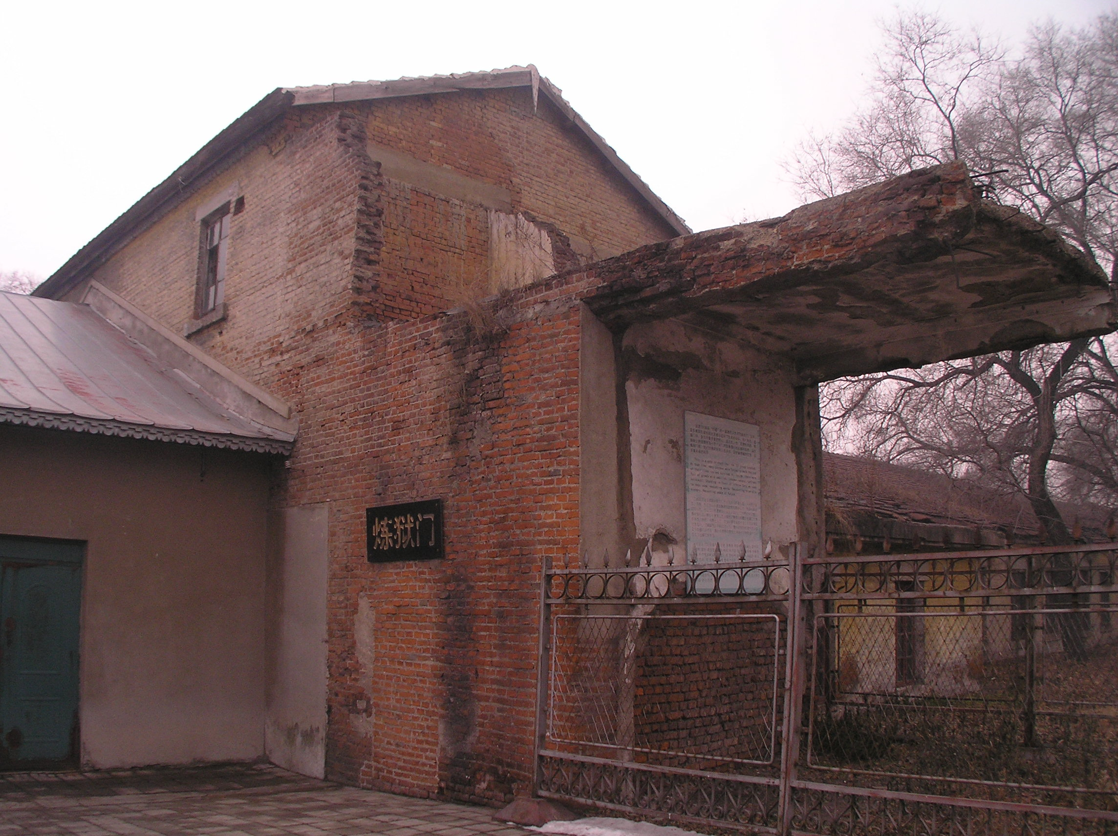 Building on the site of the Harbin bioweapon facility of Unit 731 関東軍防疫給水部本部731部隊（石井部隊） 日軍第731部隊旧址